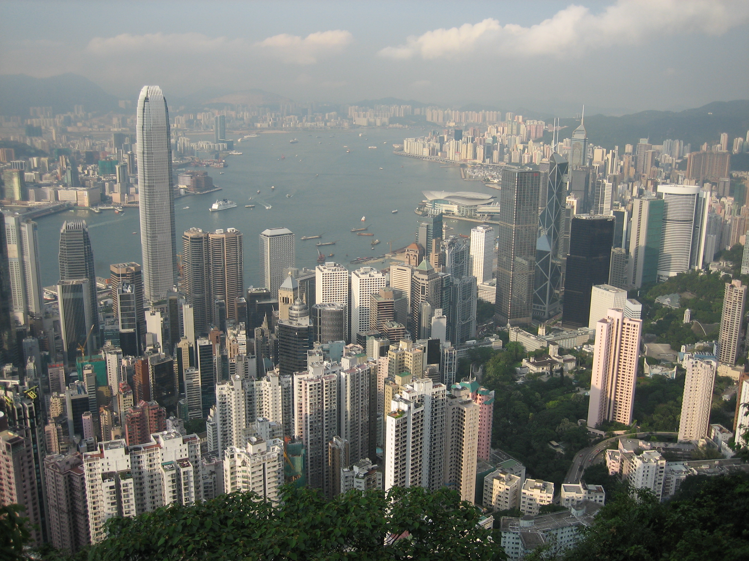 Skyline of Hong Kong.